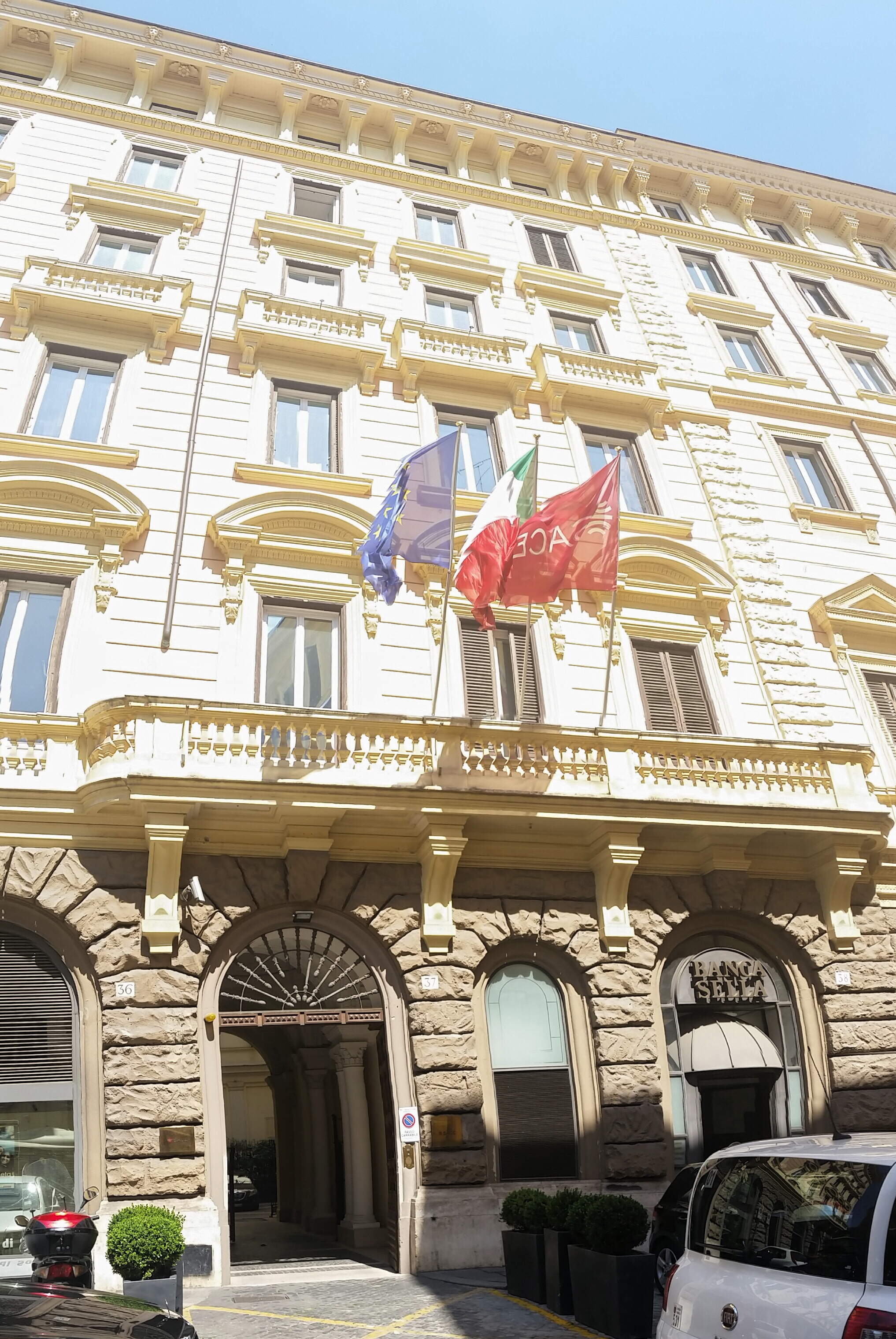 Sede centrale di SACE a Roma